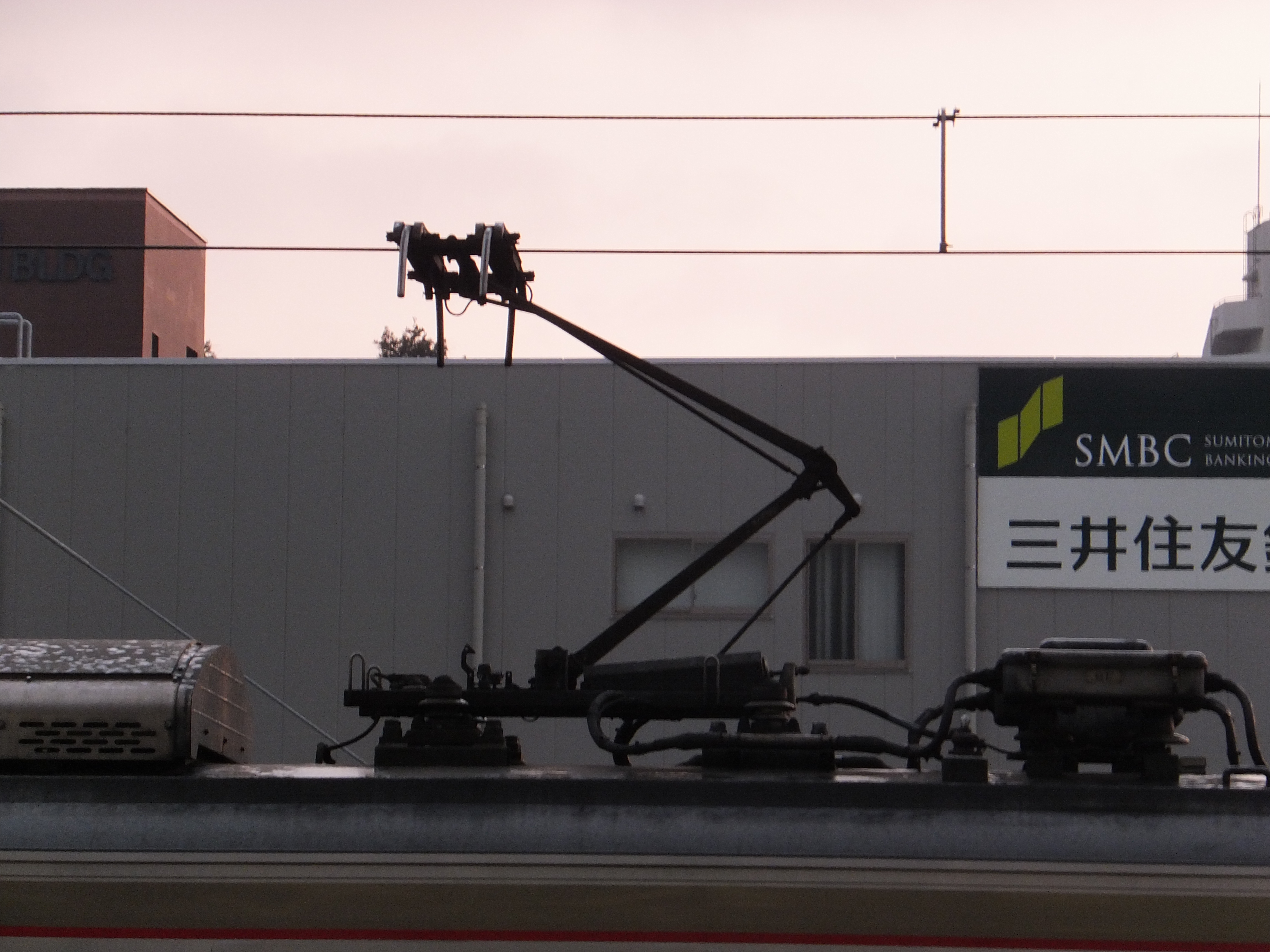 2017年1月22日、鈴蘭台駅にて撮影。車両は準急 新開地行6000系6003Ｆ。